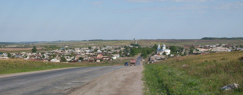 Клястицкое. Троицкий район